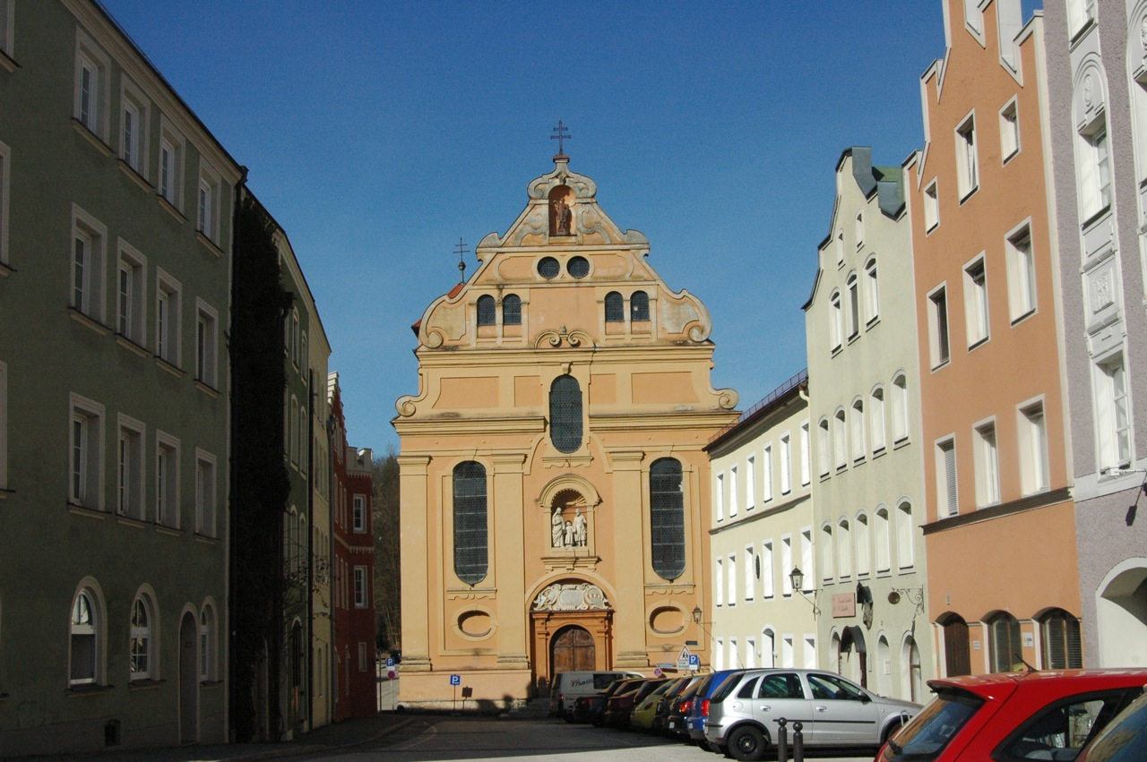 Jesuitenkolleg in der Altstadt Burghausen